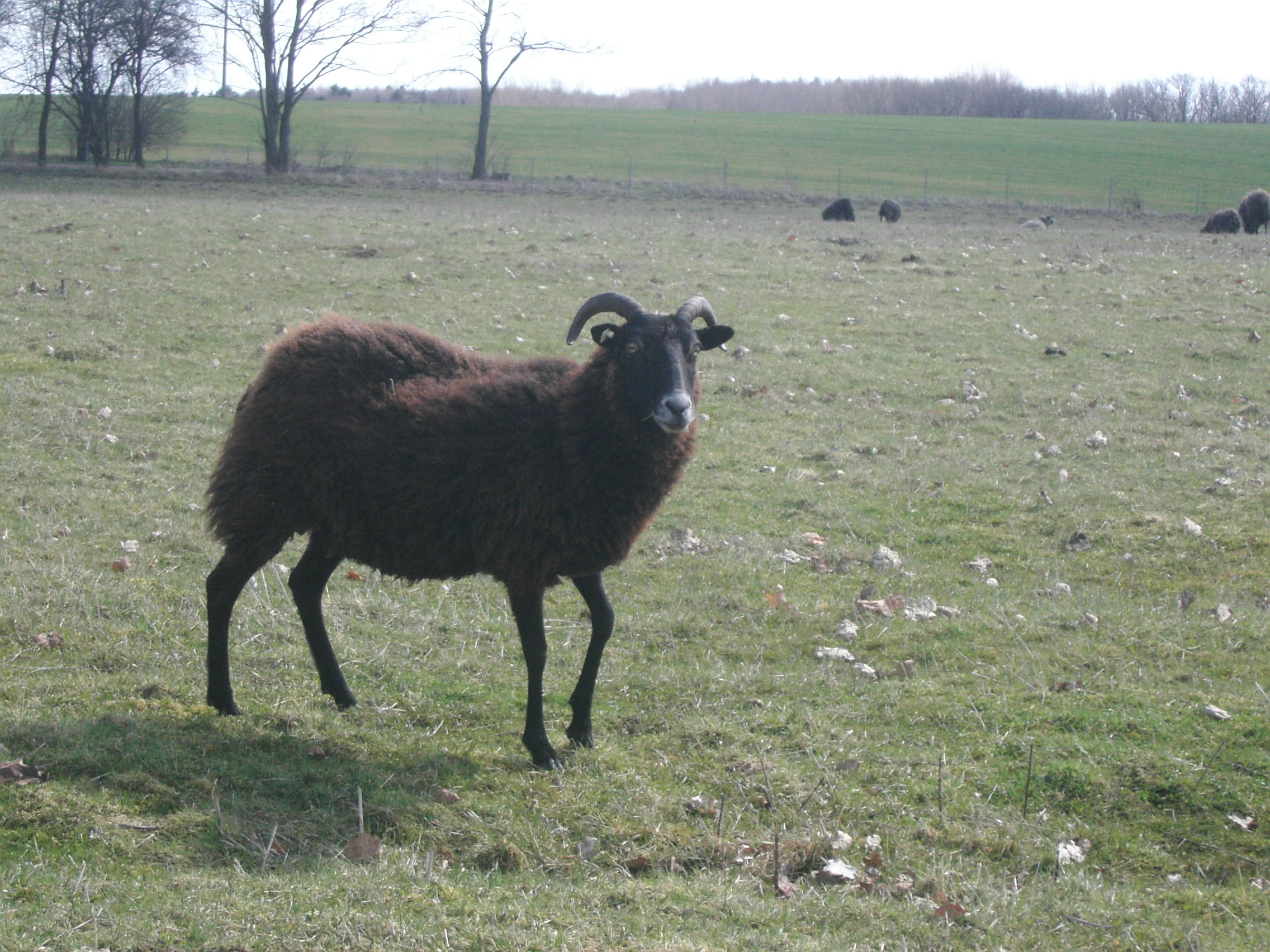 Gotlandschaf Aue